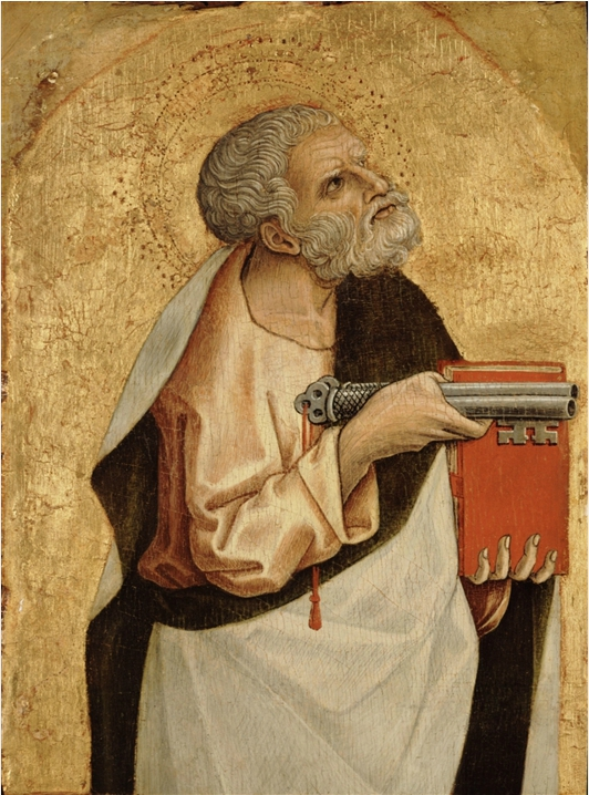 Carlo crivelli, montefiore, apostolo di detroit (s. pietro)